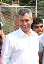 Imagen del Licenciado Mario Anguiano Moreno